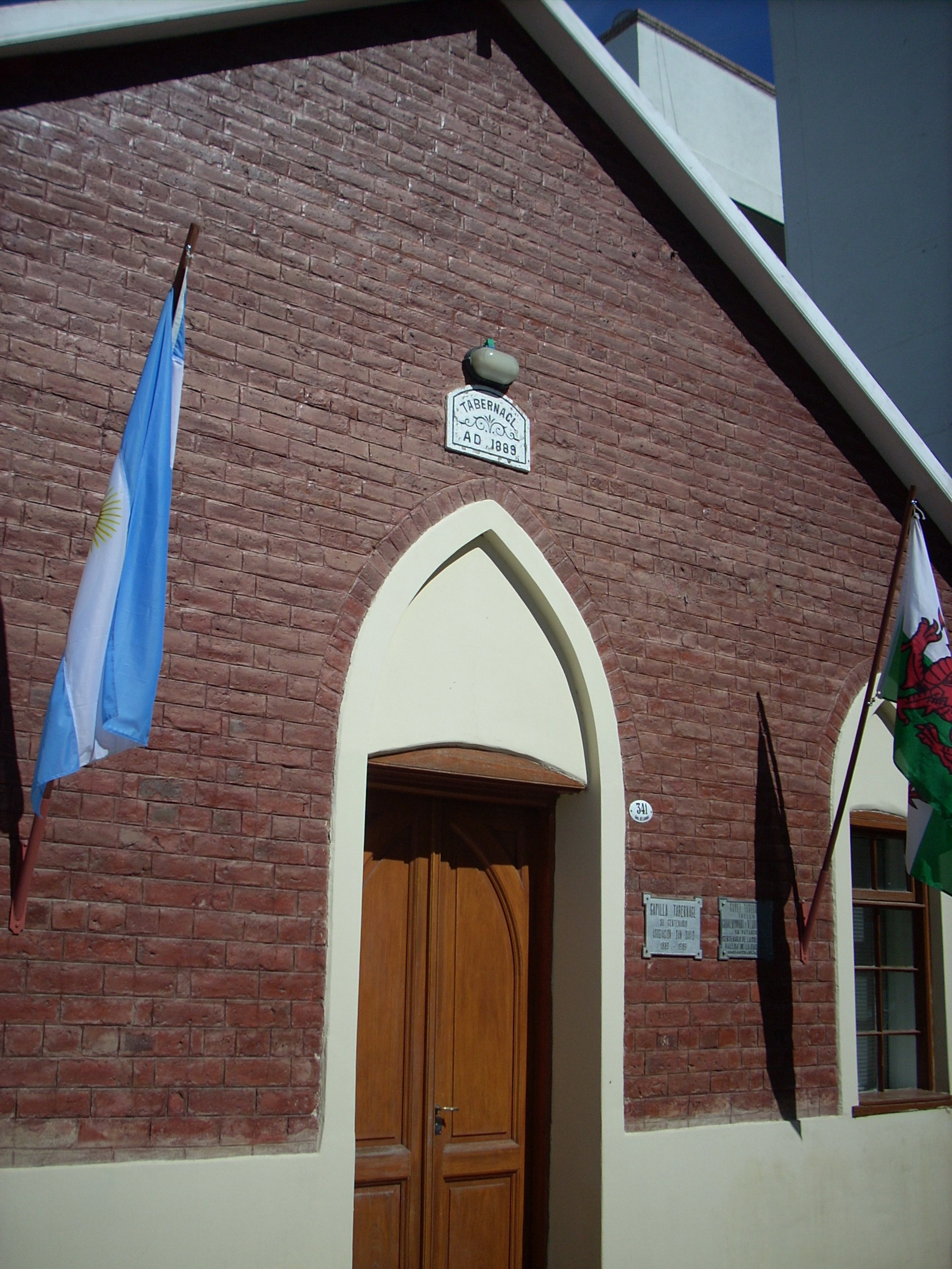 La Capilla Tabernacl de Trelew. Es la edificación más antigua de esta ciudad